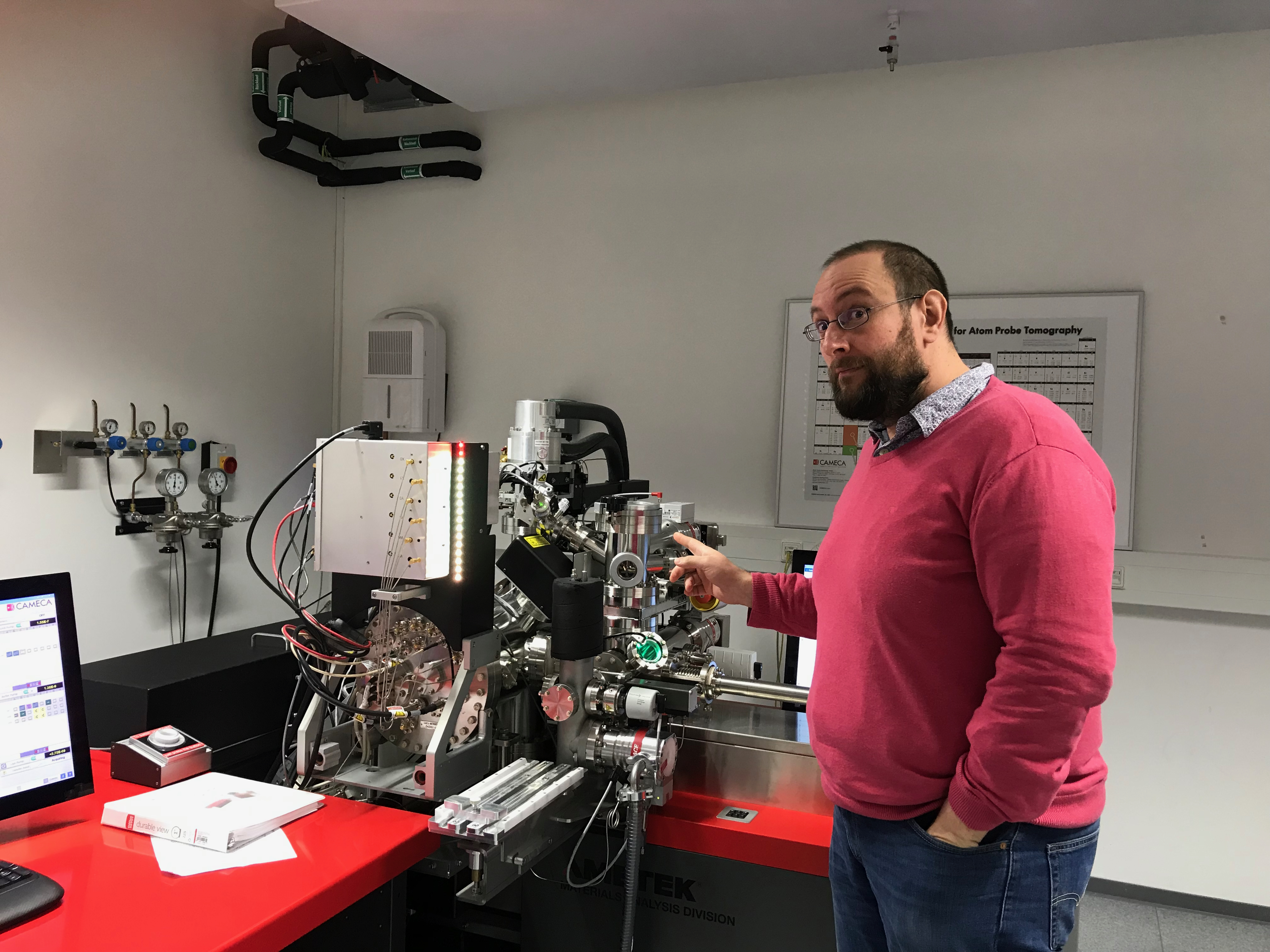 Baptiste Gault devant un microscope à sonde atomique au MPIE